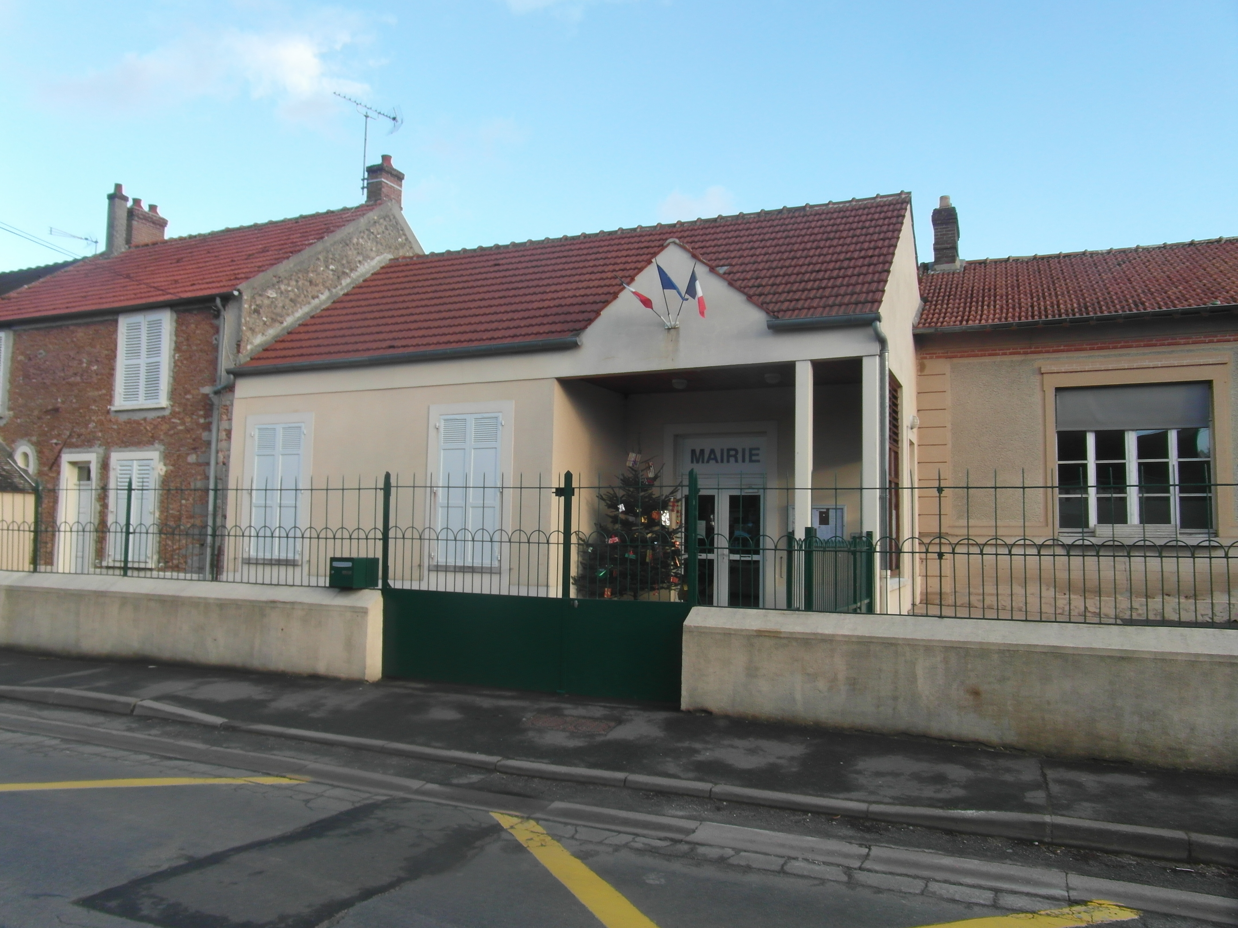 Mairie d'Aubepierre-Ozouer-le-Repos (Seine-et-Marne)